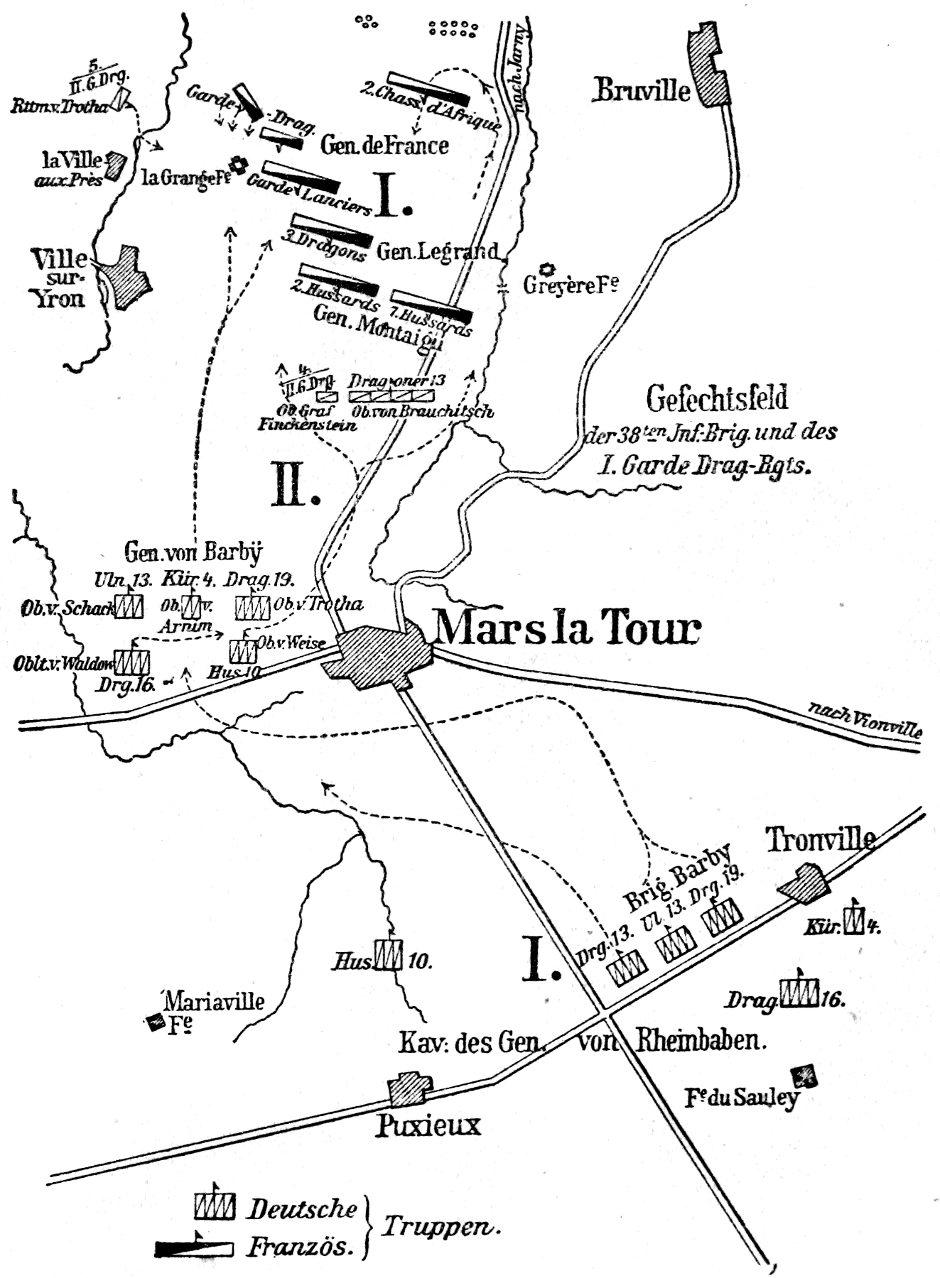 Reiterkampf bei Mars-la-Tour; deutsch-französischer Krieg, 16. August 1870